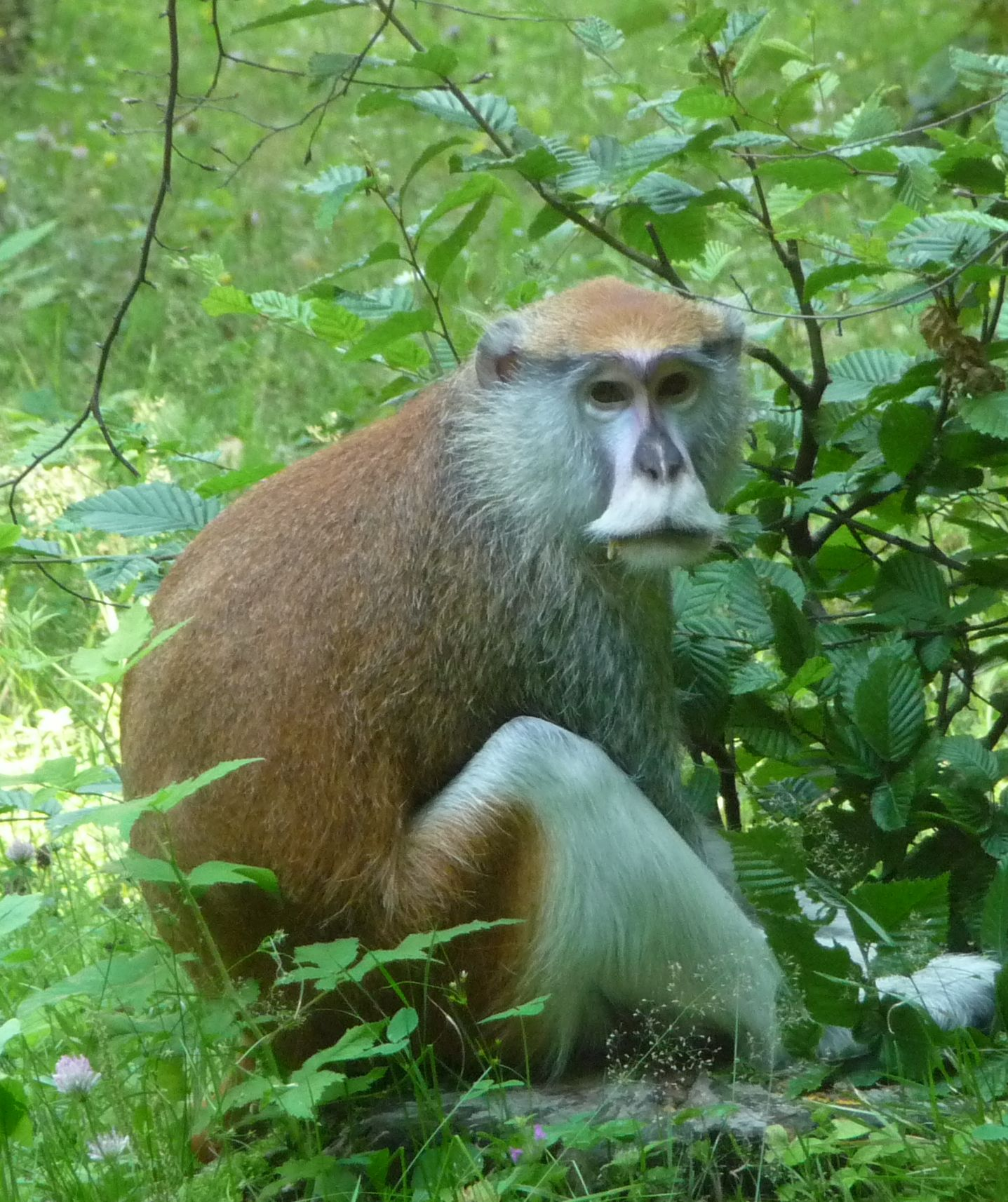 Huszármajom (Erythrocebus patas) a miskolci állatkertben